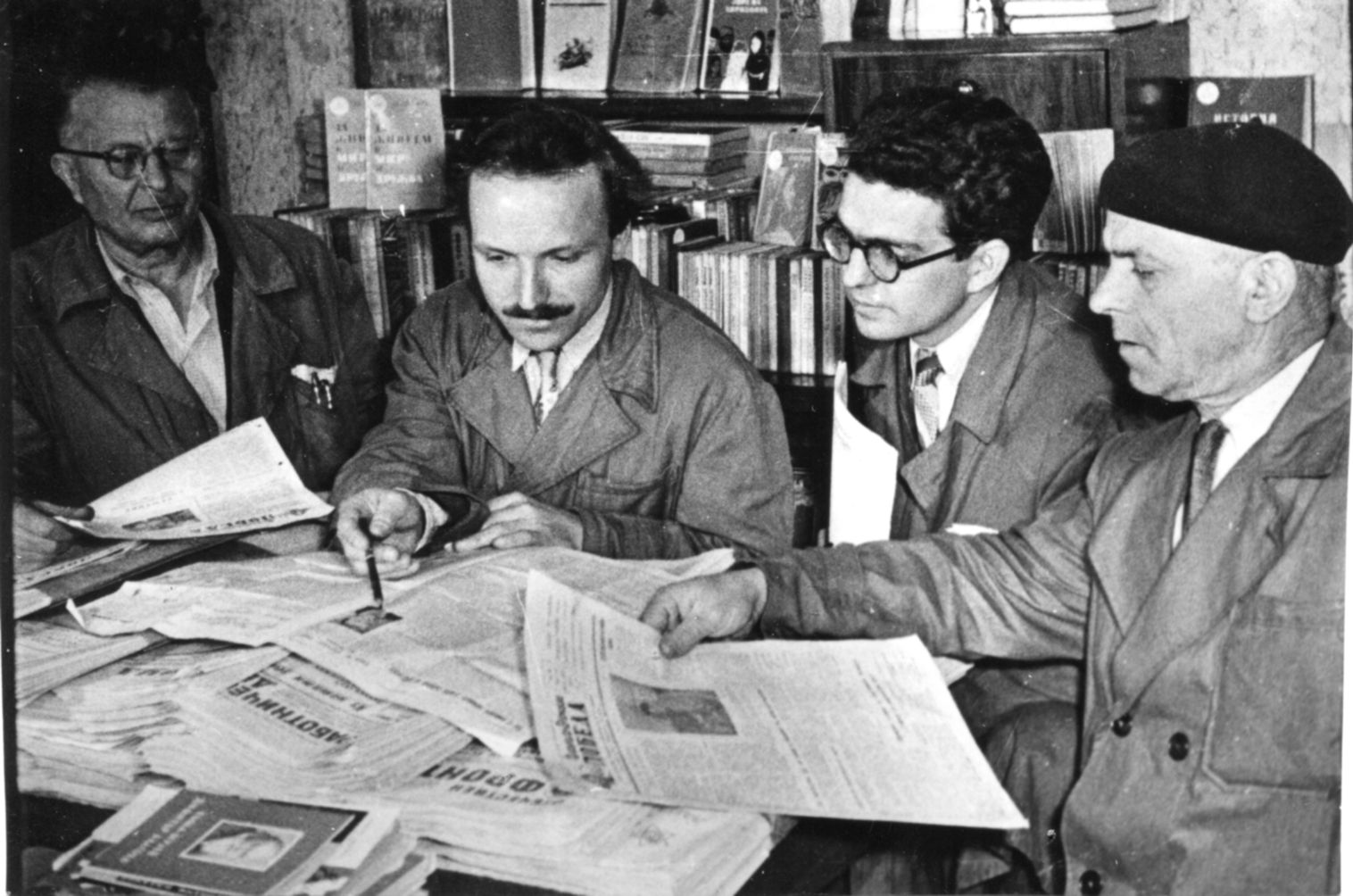 Редколегията на вестник "Заводска победа" обсъжда новия брой